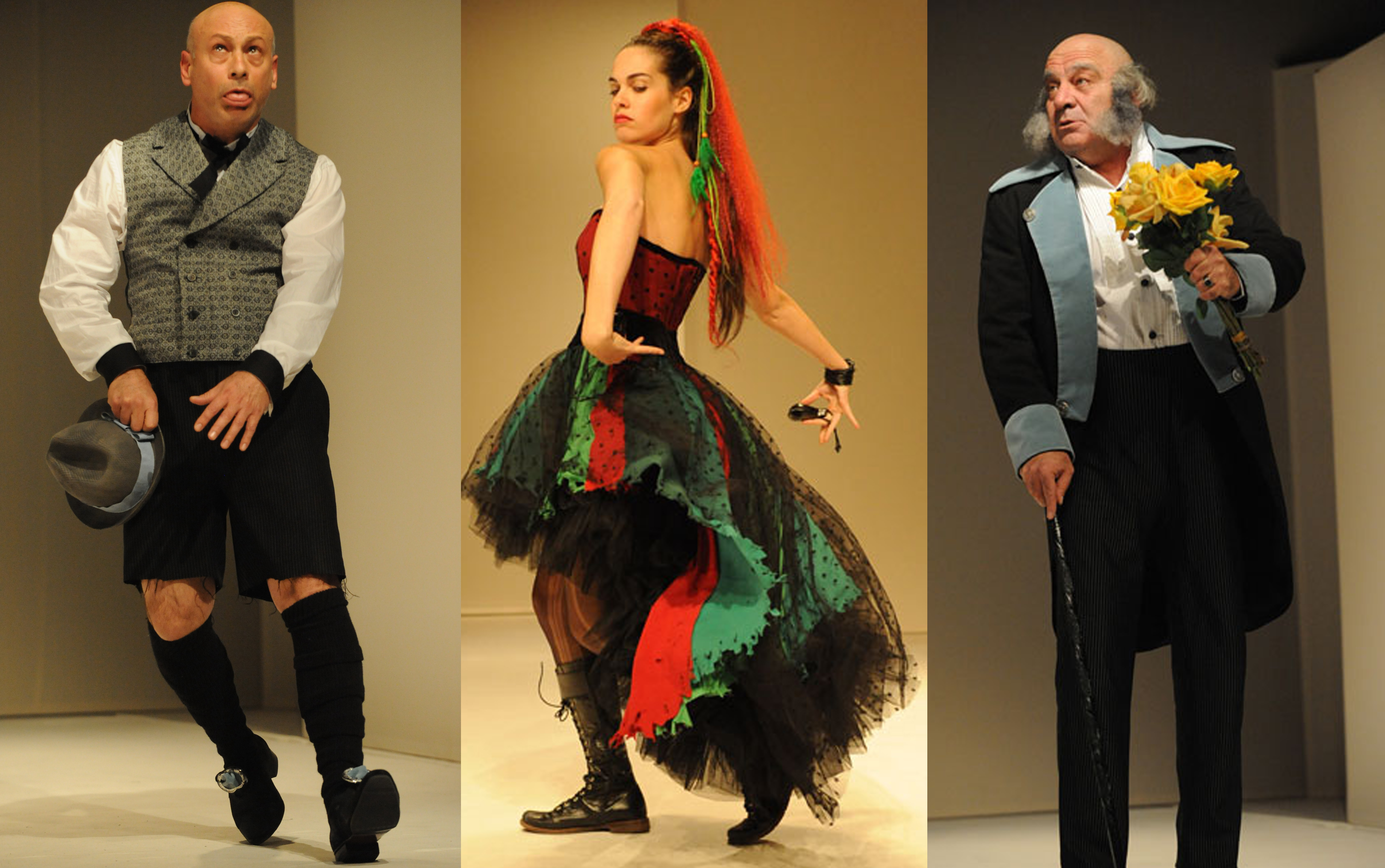 דנה צרפתי עיצוב תלבושות, פרידה קלפהולץ עיצוב התפאורה , מימין לשמאל אריה צ'רנר, נילי רוגל וארז שפריר בתעלולי סקפן בבימויו של אודי בן-משה, תיאטרון החאן